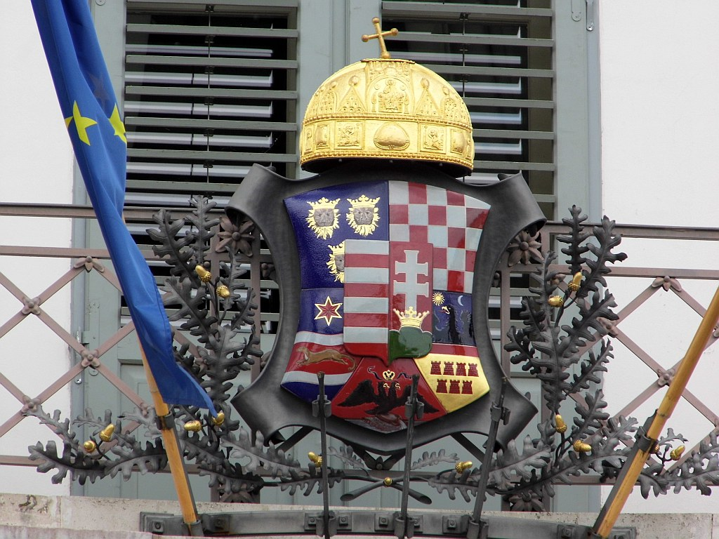 Sándor-palota This is a photo of a monument in Hungary. Identifier: 137